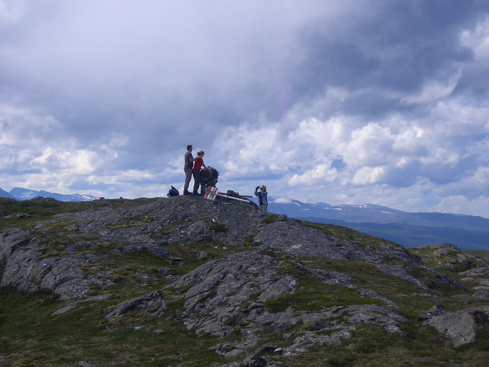 Jøngfjellet i Meldal kommune i Sør-Trøndelag.